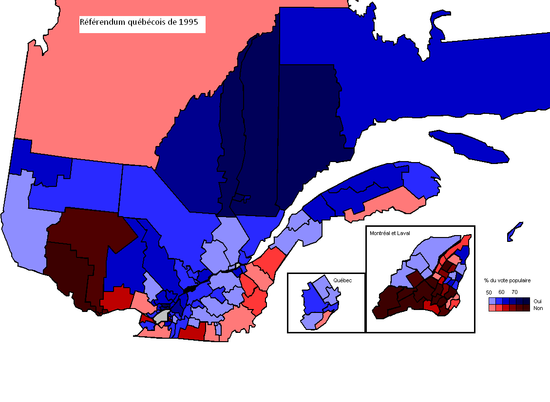 Carte du référendum québécois de 1995. Elle indique le vote populaire par circonscription.